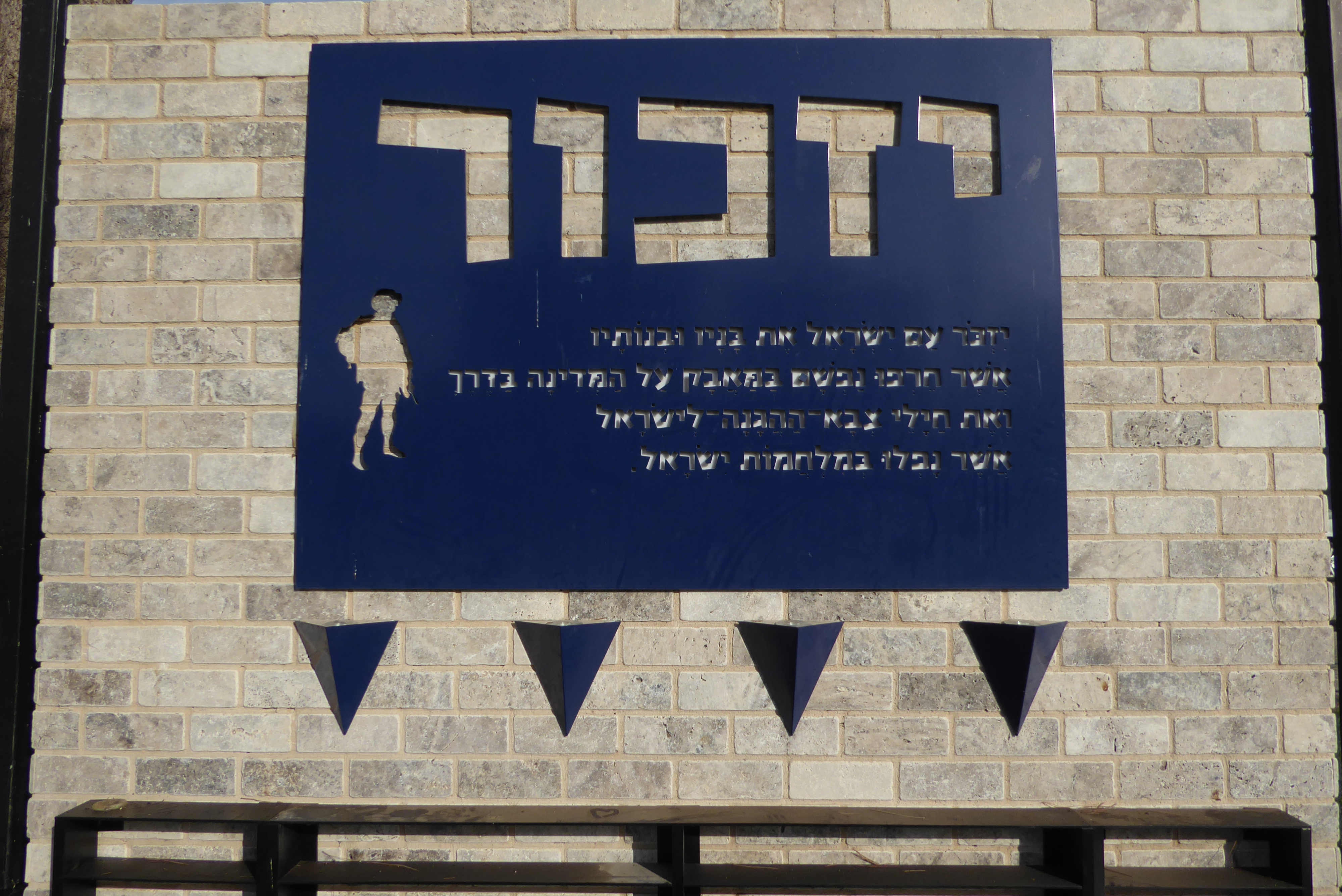 בית מורשת יהדות תימן - ראש העין - אתרי מורשת במרכז הארץ 2016